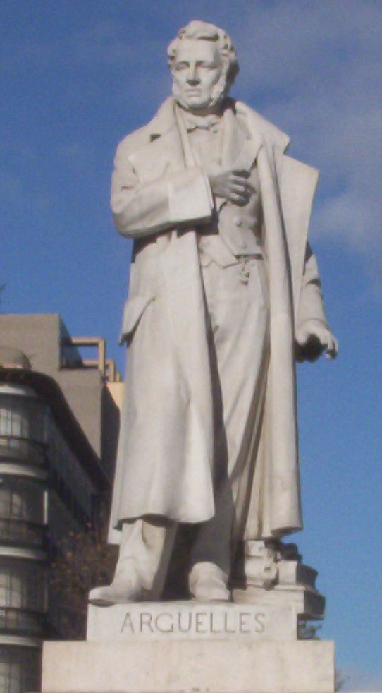 Statue of Agustín Argüelles